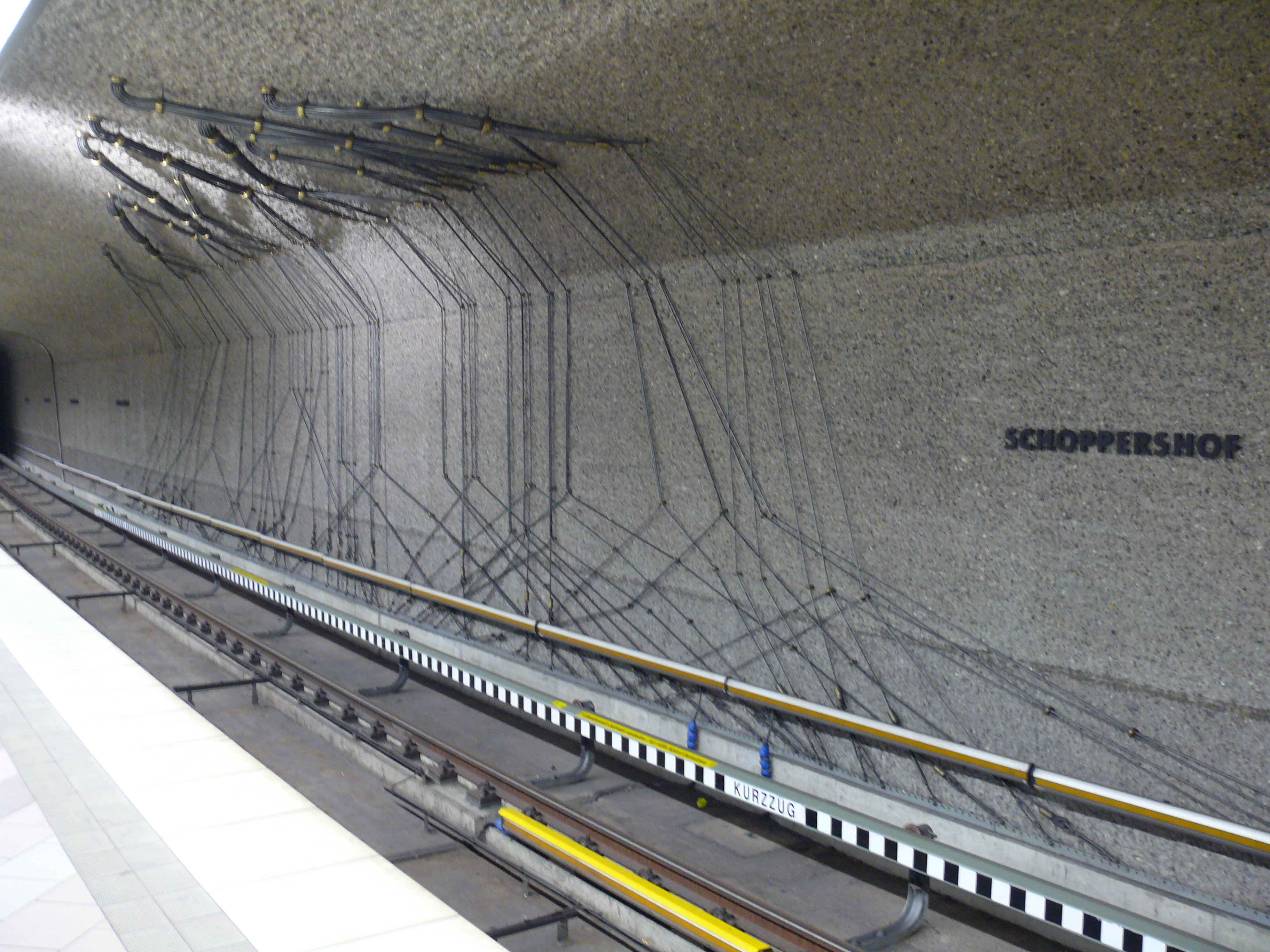 Geflecht aus Stahlseilen am U-Bahnhof Schoppershof in Nürnberg.